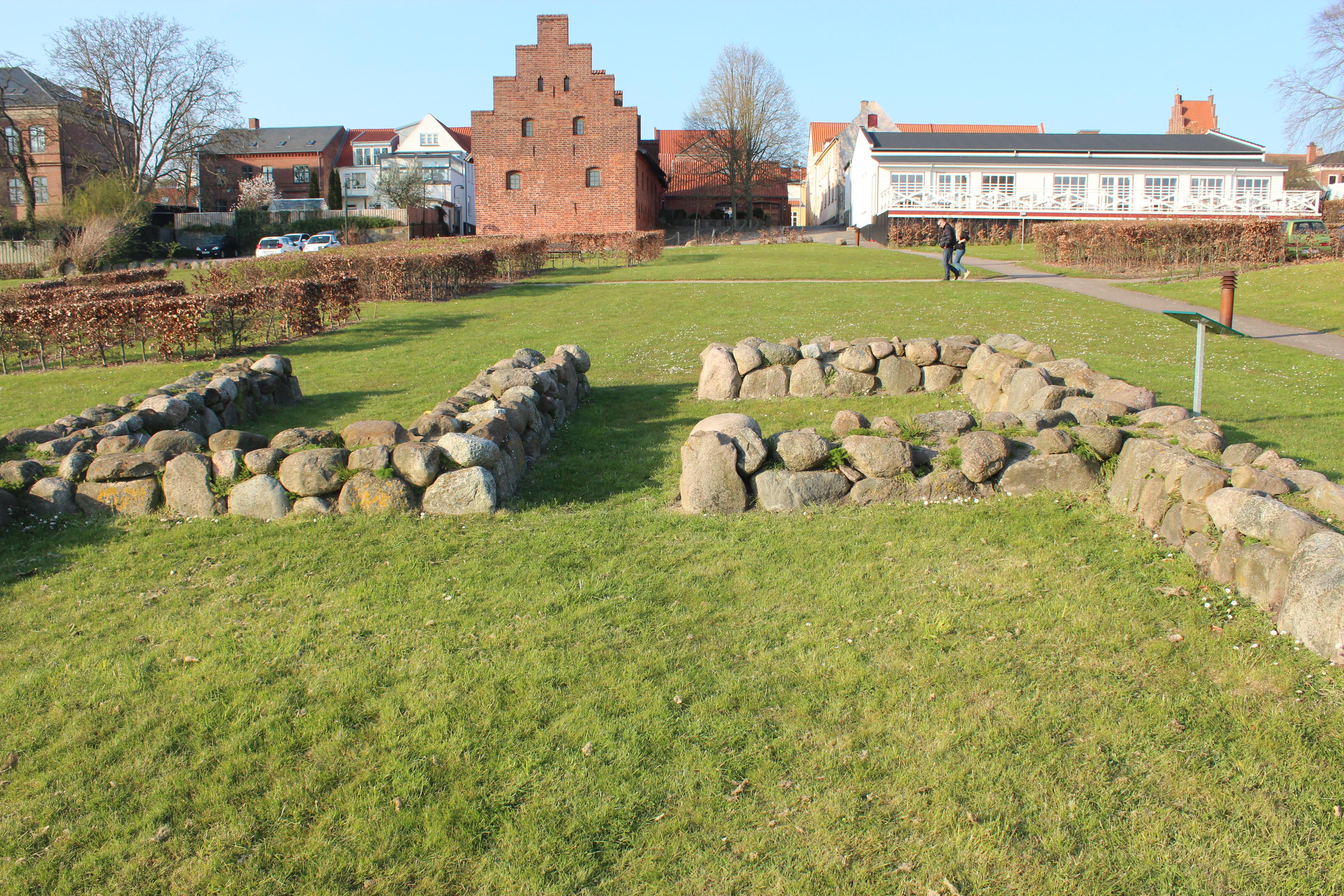 I baggrunden ses Kompagnihuset